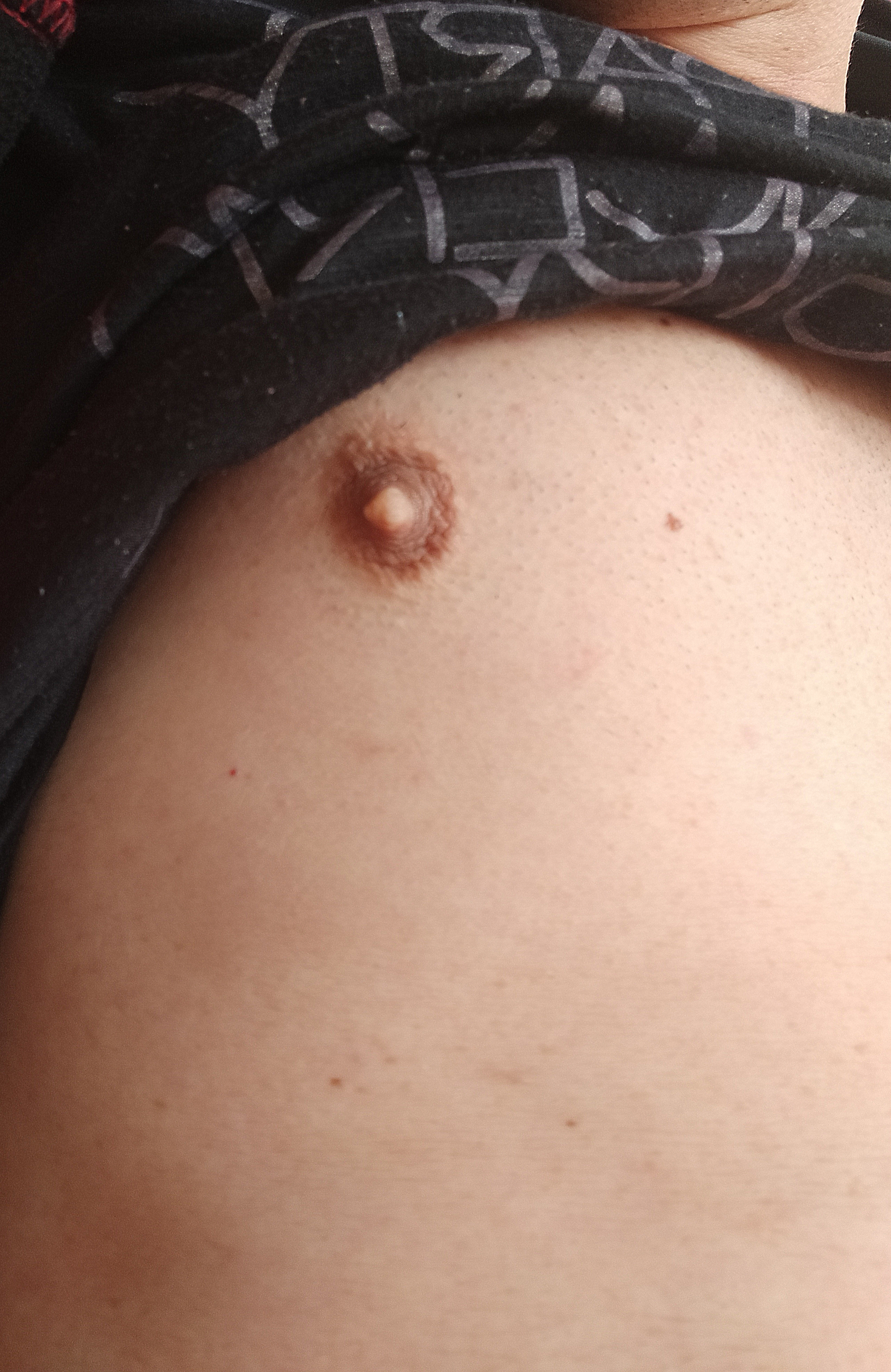 Mamilo Masculino, mamilo de macho